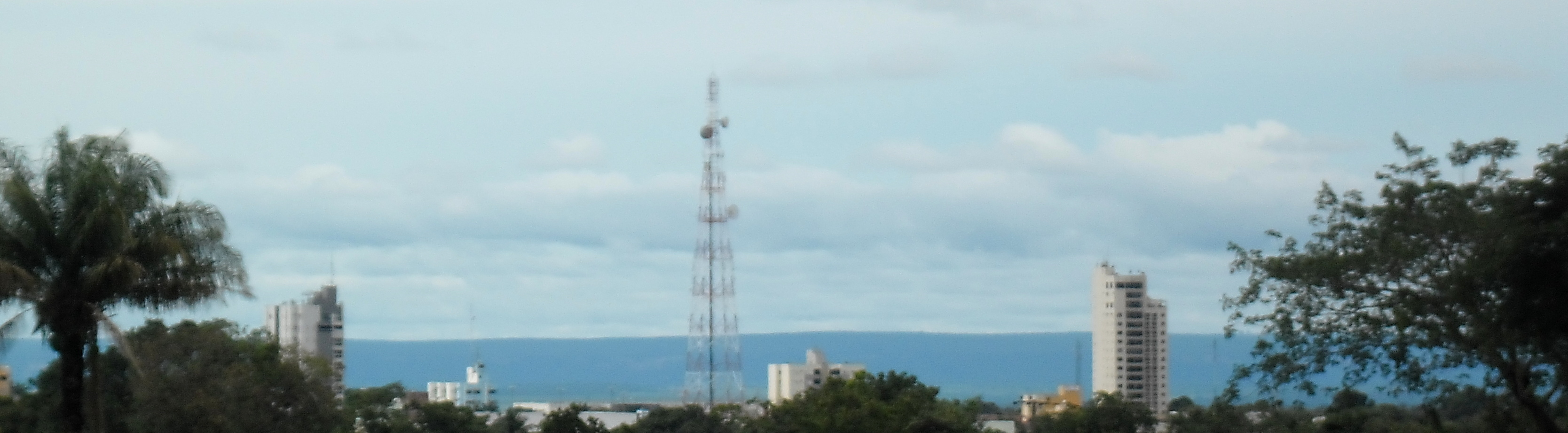 Vista panorâmica de Tangará da Serra. Pai